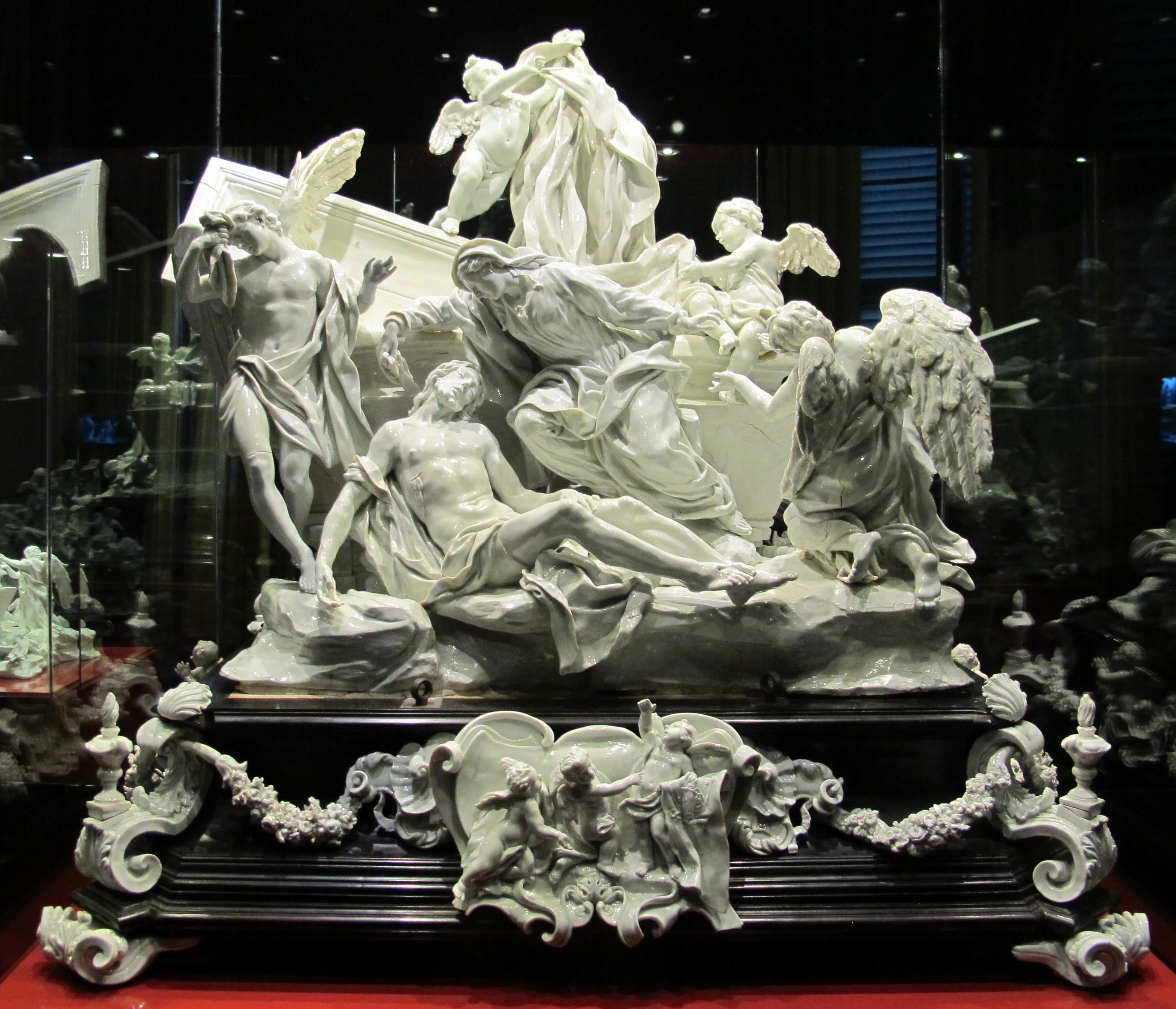 XXVIII Biennale dell'Antiquariato (2013)